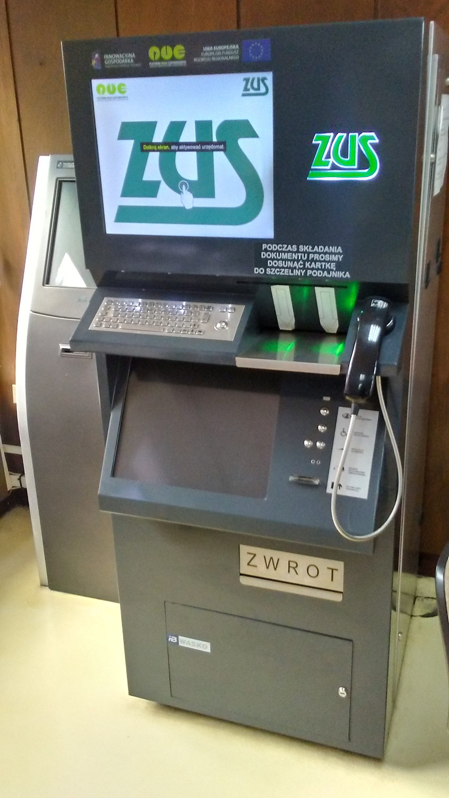 Tomaszów Mazowiecki w wojewódtwie łódzkim. Automat do przyjmowania dokumentów (urzędomat), w lokalnym Zakładzie Ubezpieczeń Społecznych. PL, EU, CC0